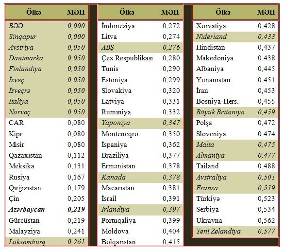 MƏH sub indeksi üzrə ölkələrin sıralaması